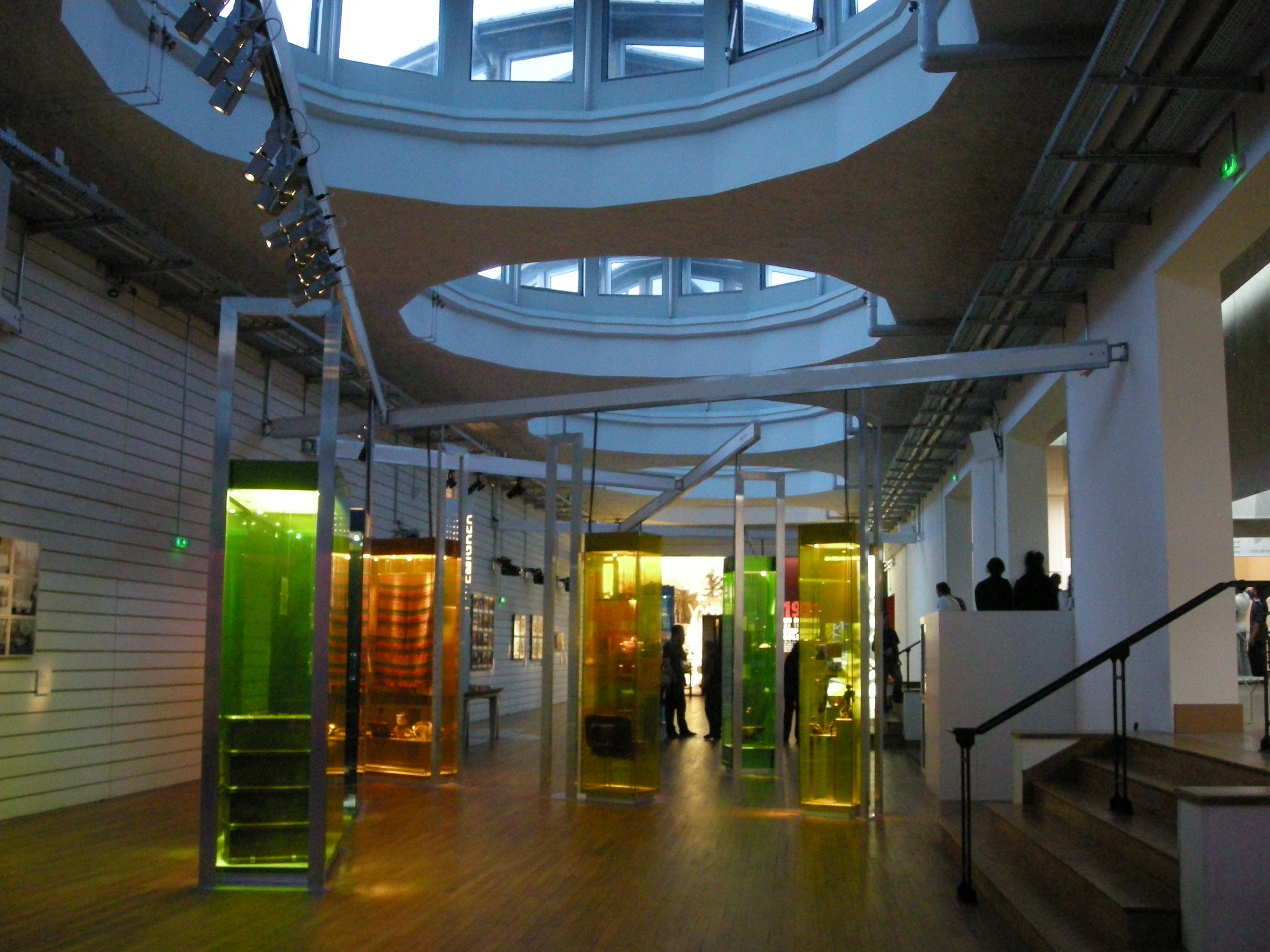 Salle d'exposition permanente à la Cité nationale de l'histoire de l'immigration à Paris